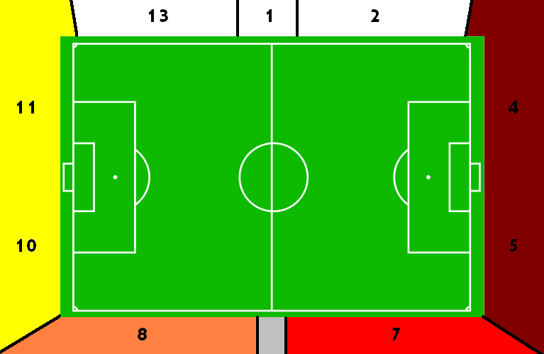 תרשים השערים בבלומפילד